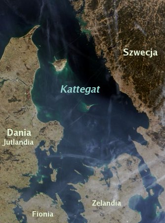 Satelitarne zdjęcie Kattegat z polskim opisem